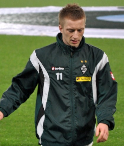 Marco Reus vor dem Spiel gegen Kaiserslautern